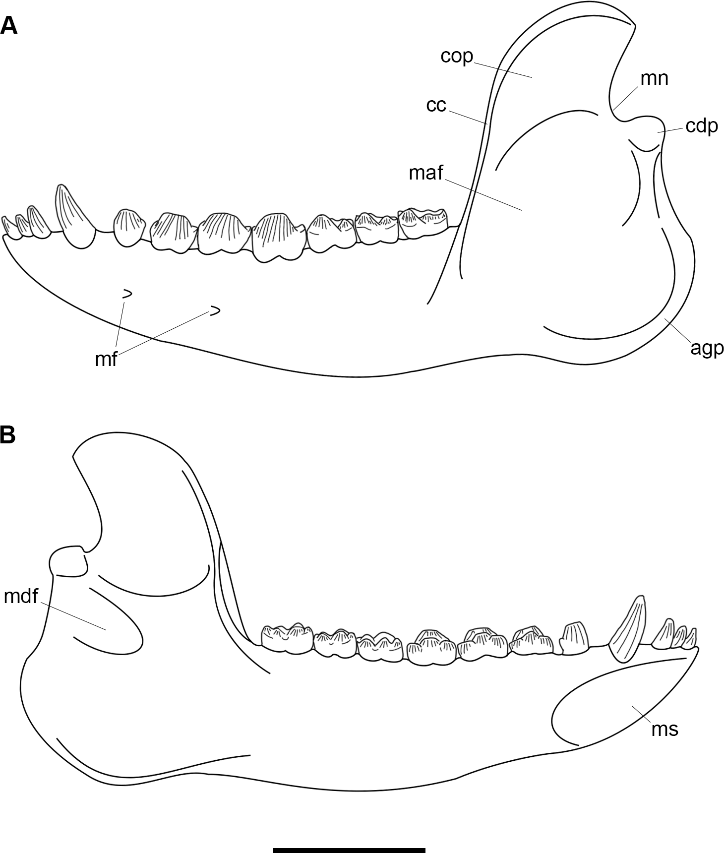 Annotated line drawing of the left dentary of Periptychus carinidens. (A) lateral view; (B) medial view. Abbreviations: agp, angular process; cc, coronoid crest; cdp, condyloid process; cop, coronoid process; maf, masseteric fossa; mdf, mandibular foramen; mf, mandibular foramina; mn, mandibular notch; ms, mandibular symphysis. Scale bar: 30mm.